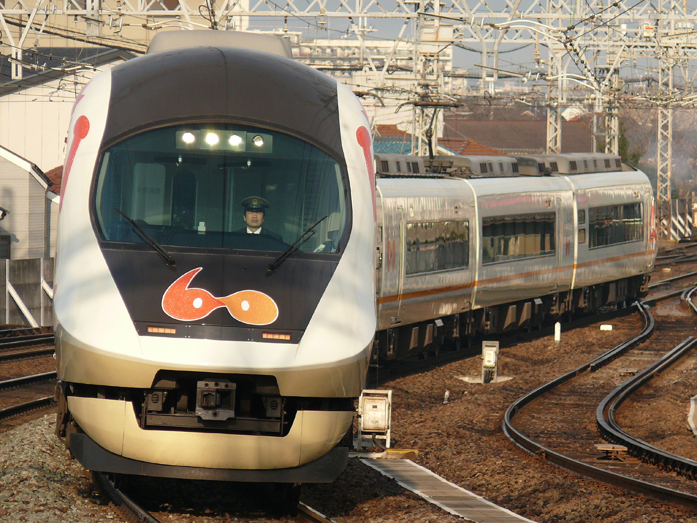 Kintetsu 21020